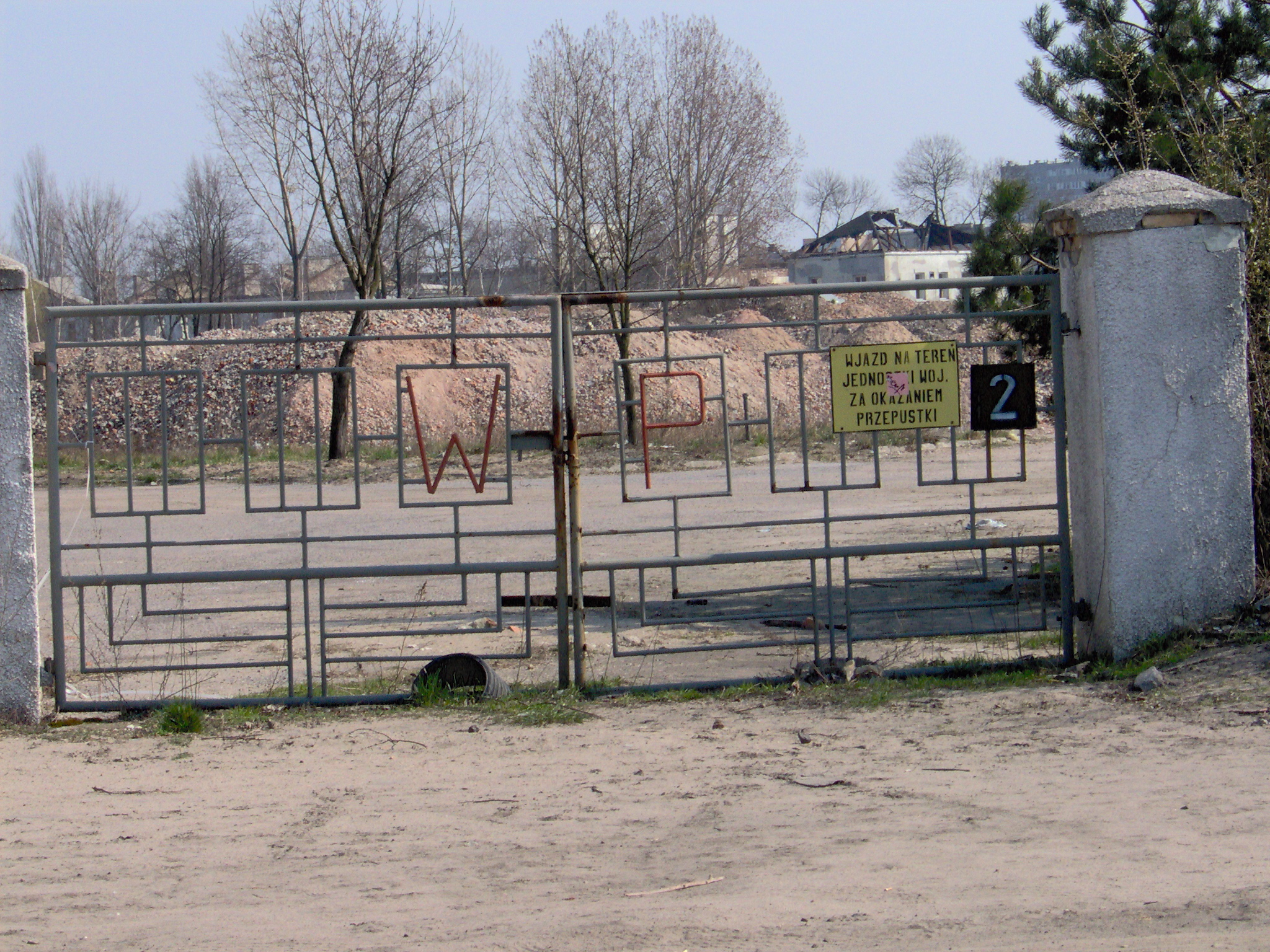 Pozostałości po bramie wjazdowej do byłej jednostki wojskowej przy ul. Żytniej 83 (brama od ul. Wojskowej - 2007 r.)